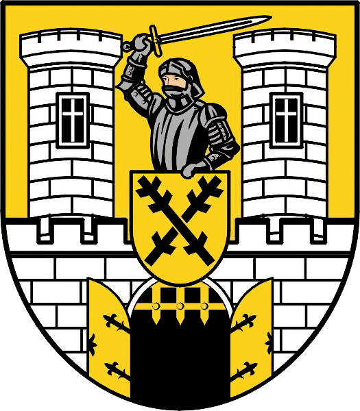 Znak města Moravské Budějovice. Ze stránek Původní formát byl JPEG.